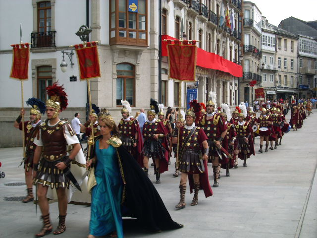 Desfile polas rúas da cidade, Arde Lucus 2009